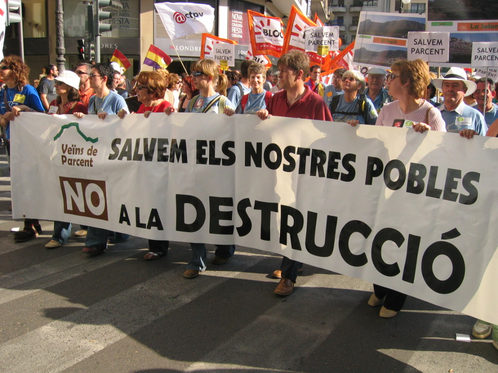 Plataforma de Veïns de Parcent. Manifestació en Ciutat de València el dissabte 3 de maig del 2006. Lema: "Pel nostre futur: Defensem el territori". Convocantari principal: Compromís pel Territori.